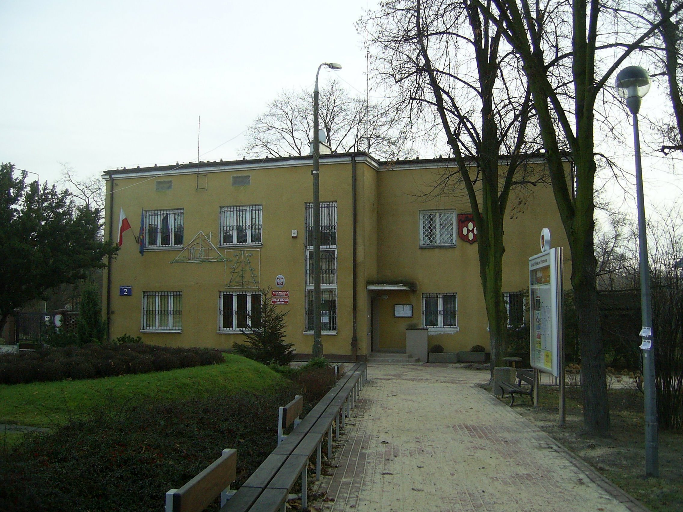 Urząd miasta w Piastowie